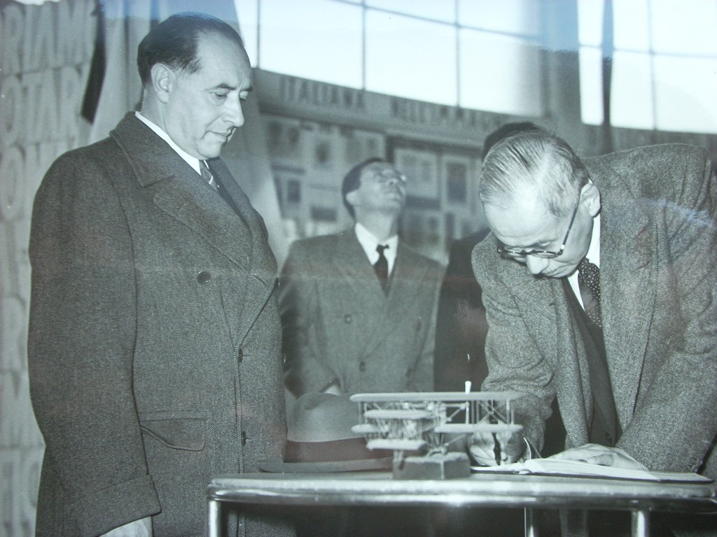 L'ambasciatore giapponese Horikiri Zambei appone la propria firma sul registro degli ospiti illustri presso le officine Caproni a Taliedo, Milano 22 aprile 1942 (Archivio famiglia Caproni Roma)